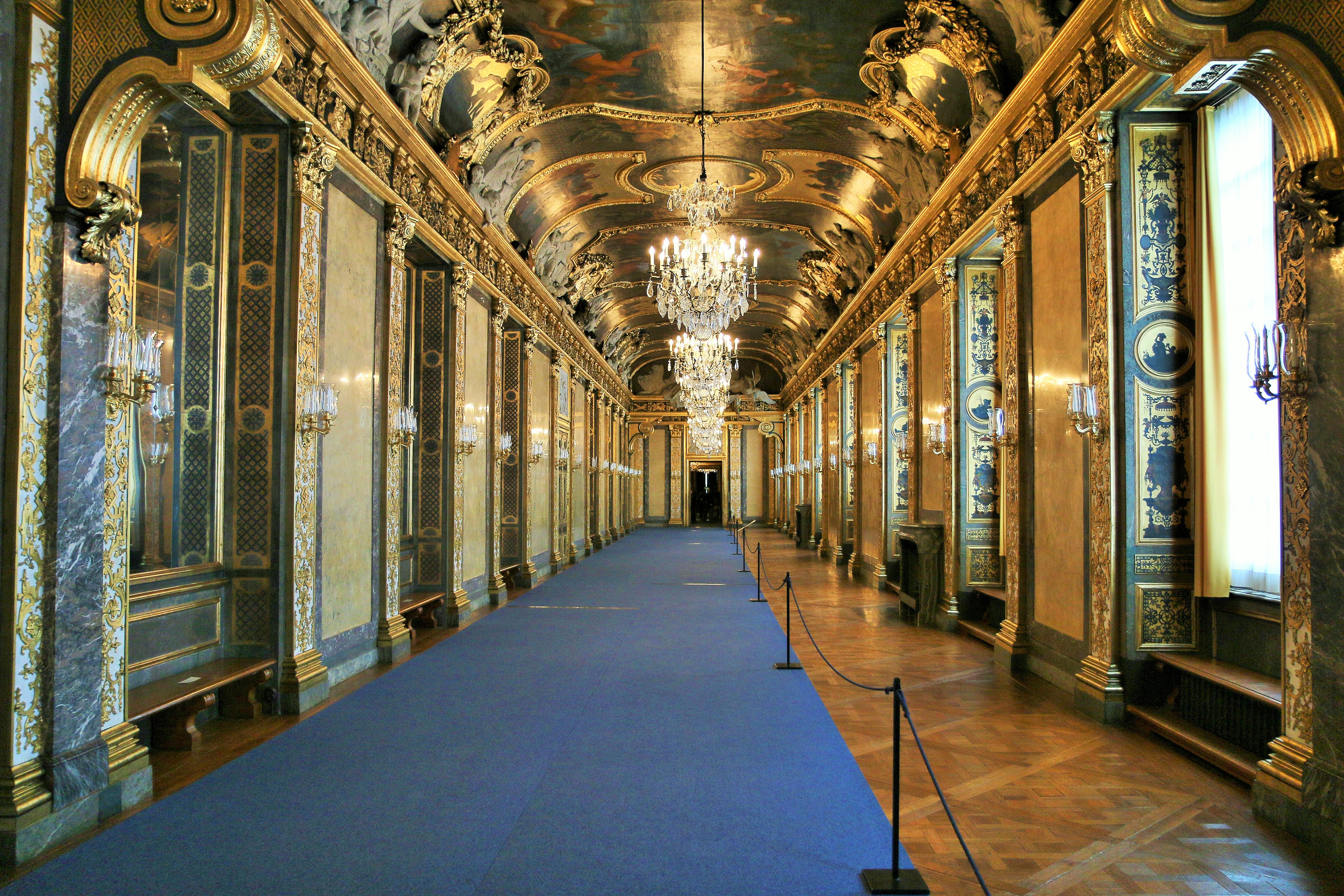 gylden gang ved stockholms slott